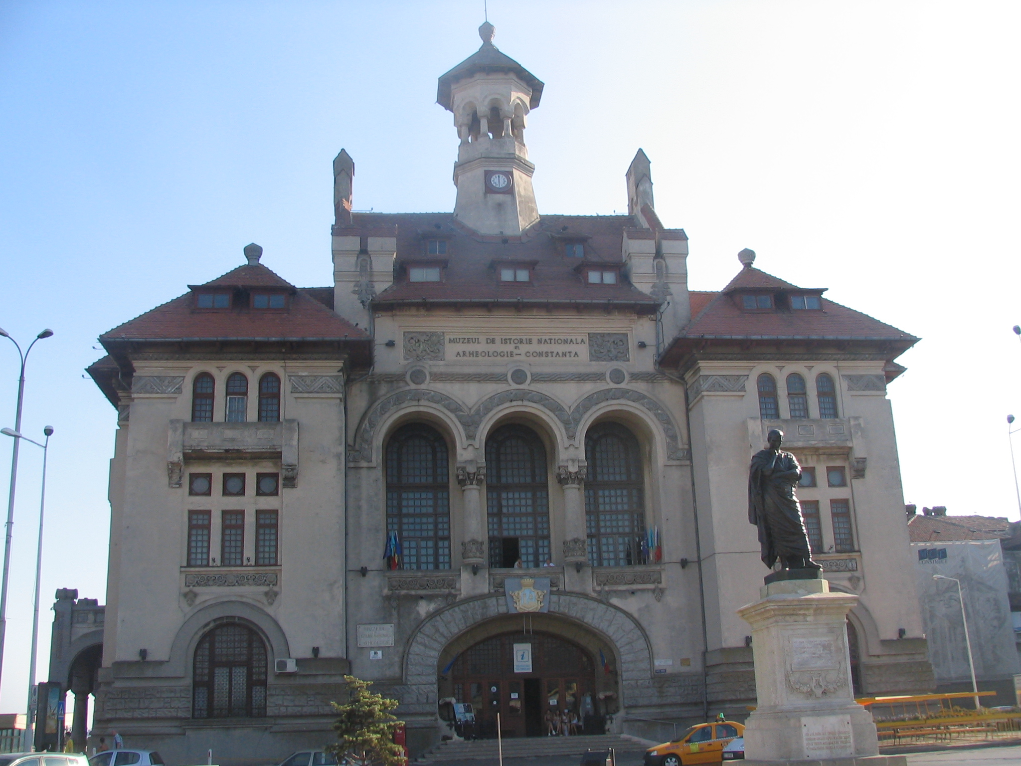 Muzeul de istorie Nationala si Arheologie, Constanta